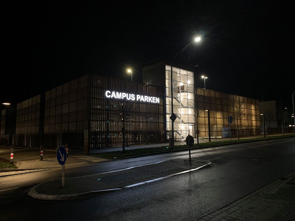 Das Bild zeigt das 2019 errichtete Parkhaus "Campus Parken" bei Dunkelheit.